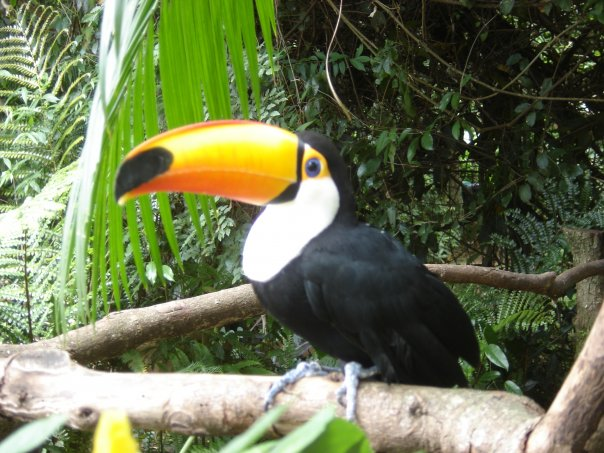 Ramphastos toco